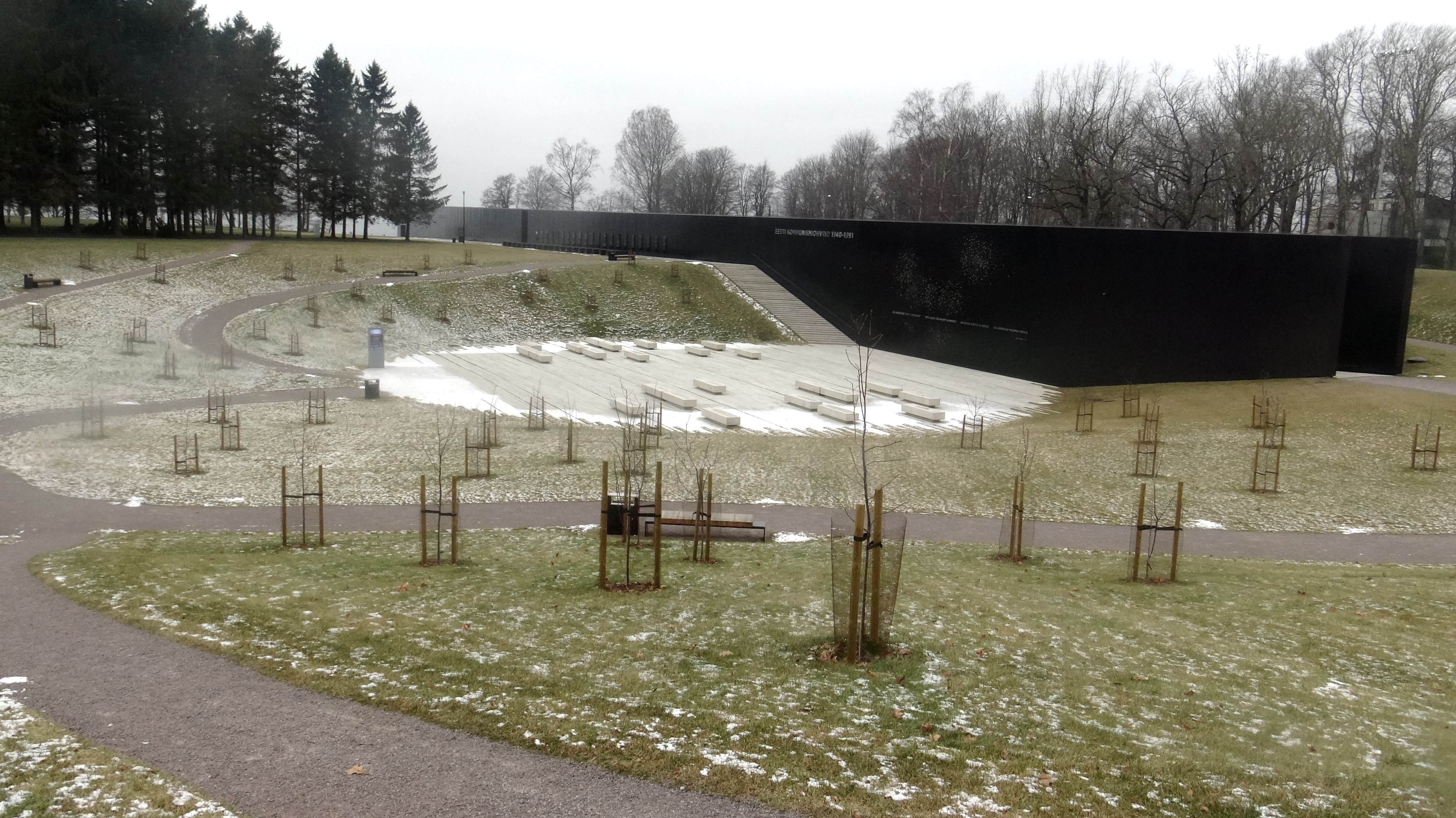 Яблоневый сад Маарьямяги